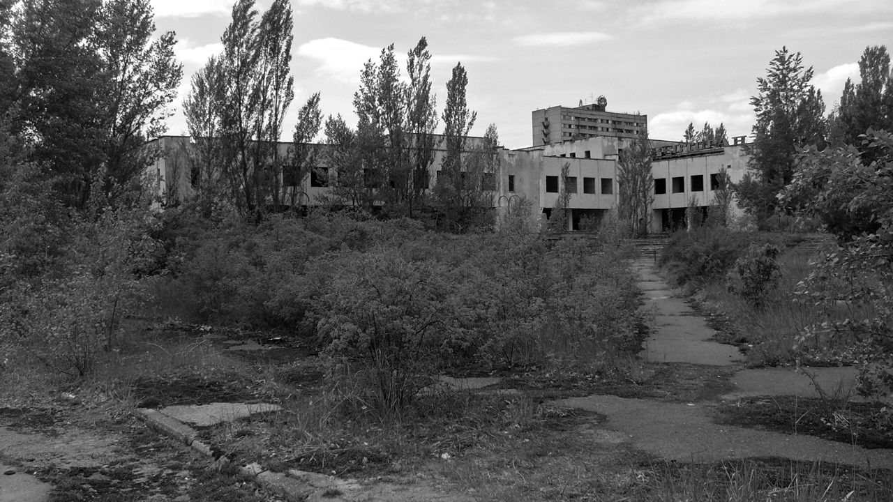 Dieses Foto habe ich während meiner Reise durch die verstrahlte Zone von Tschernobyl aufgenommen.